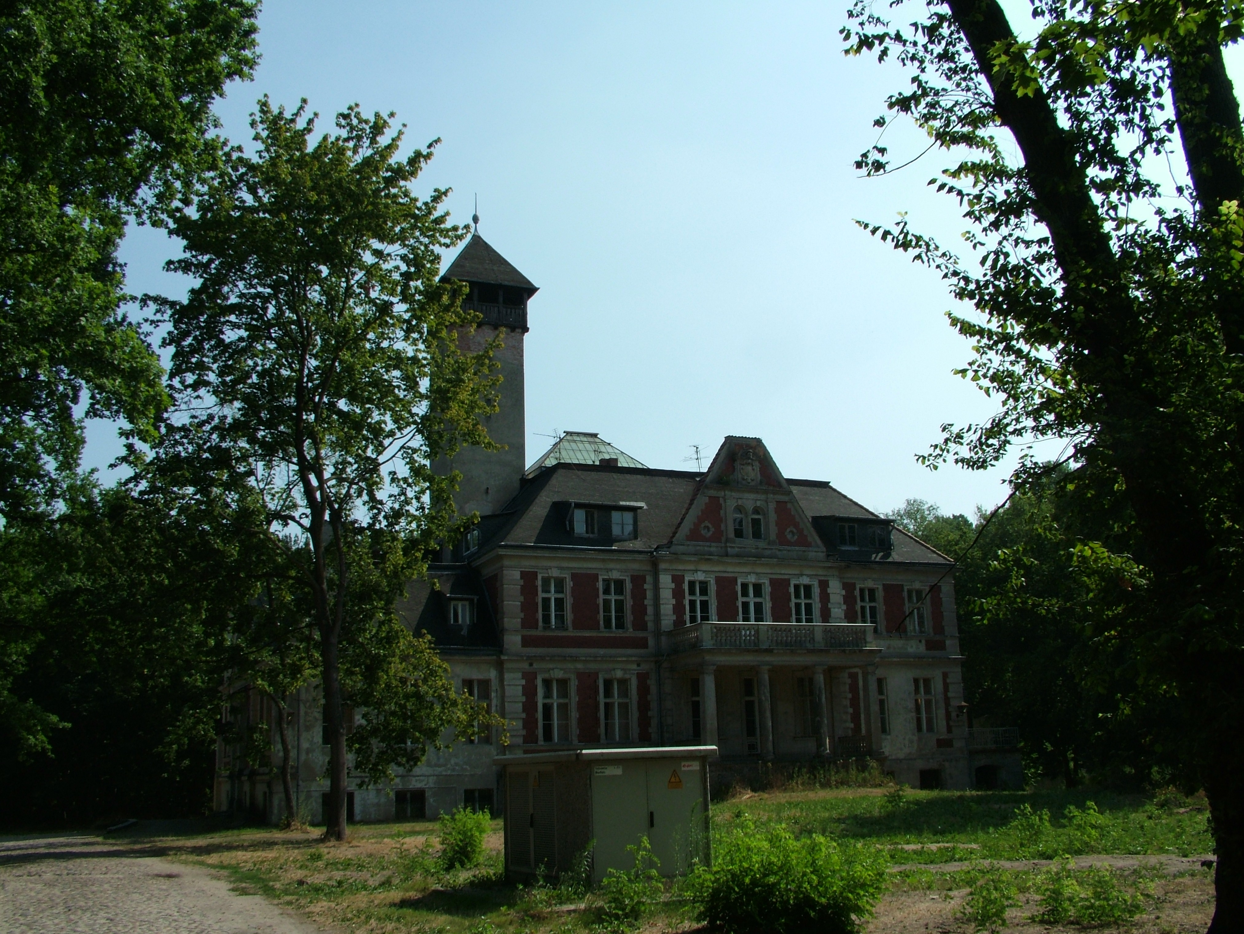 Das Gutsschloss an der Dorfaue von Schulzendorf, Brandenburg.